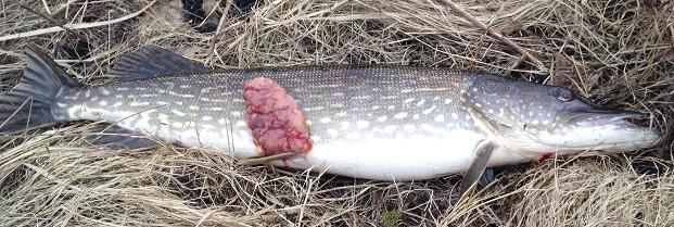 Gäddsarkom på gädda från Stensö, Kalmar. Bilden upplagd med tillstånd från fångstmannen C-A Rörkrök.